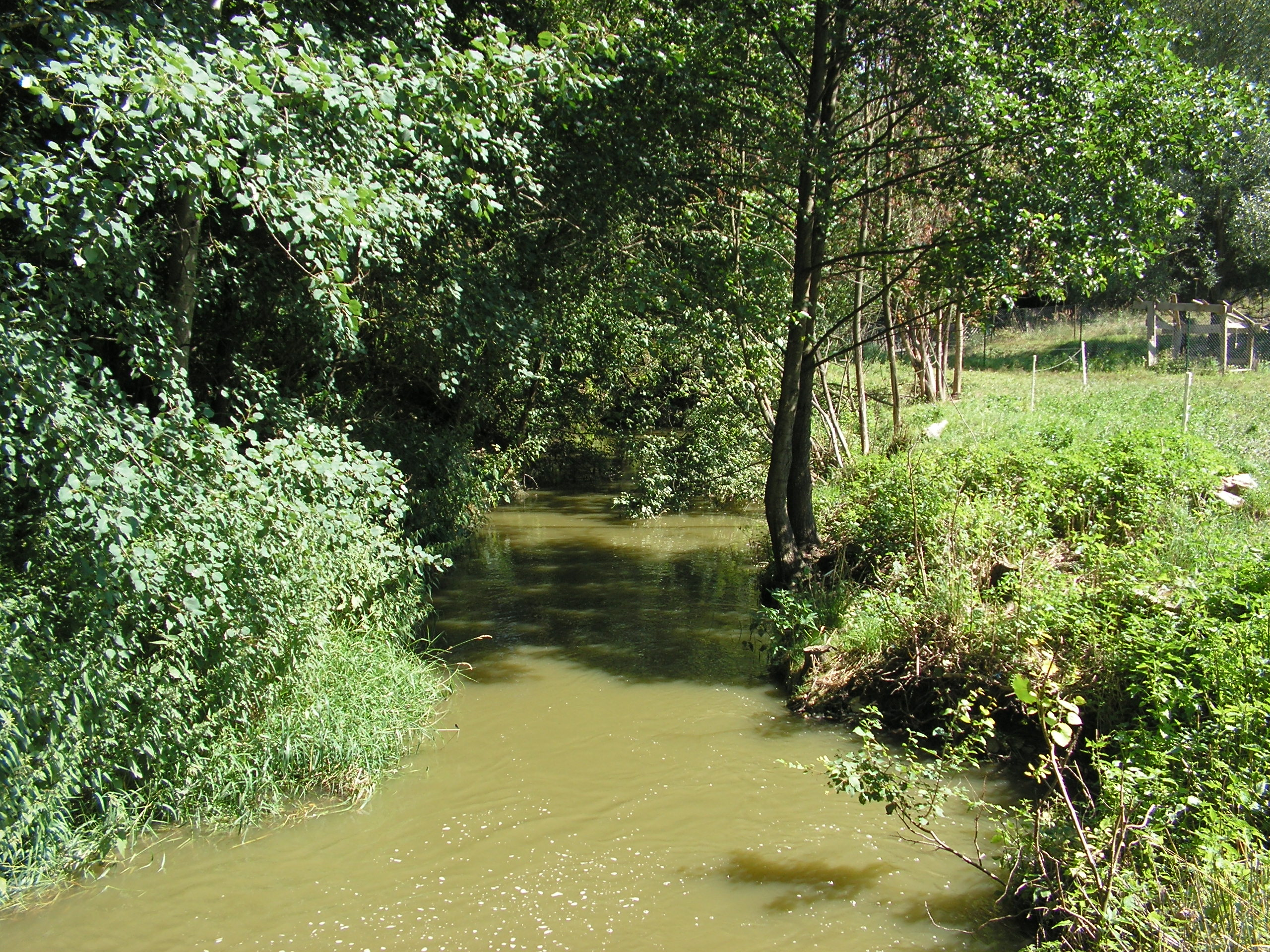 Strašický potok pod hrází rybníka Strašík v okrese Benešov